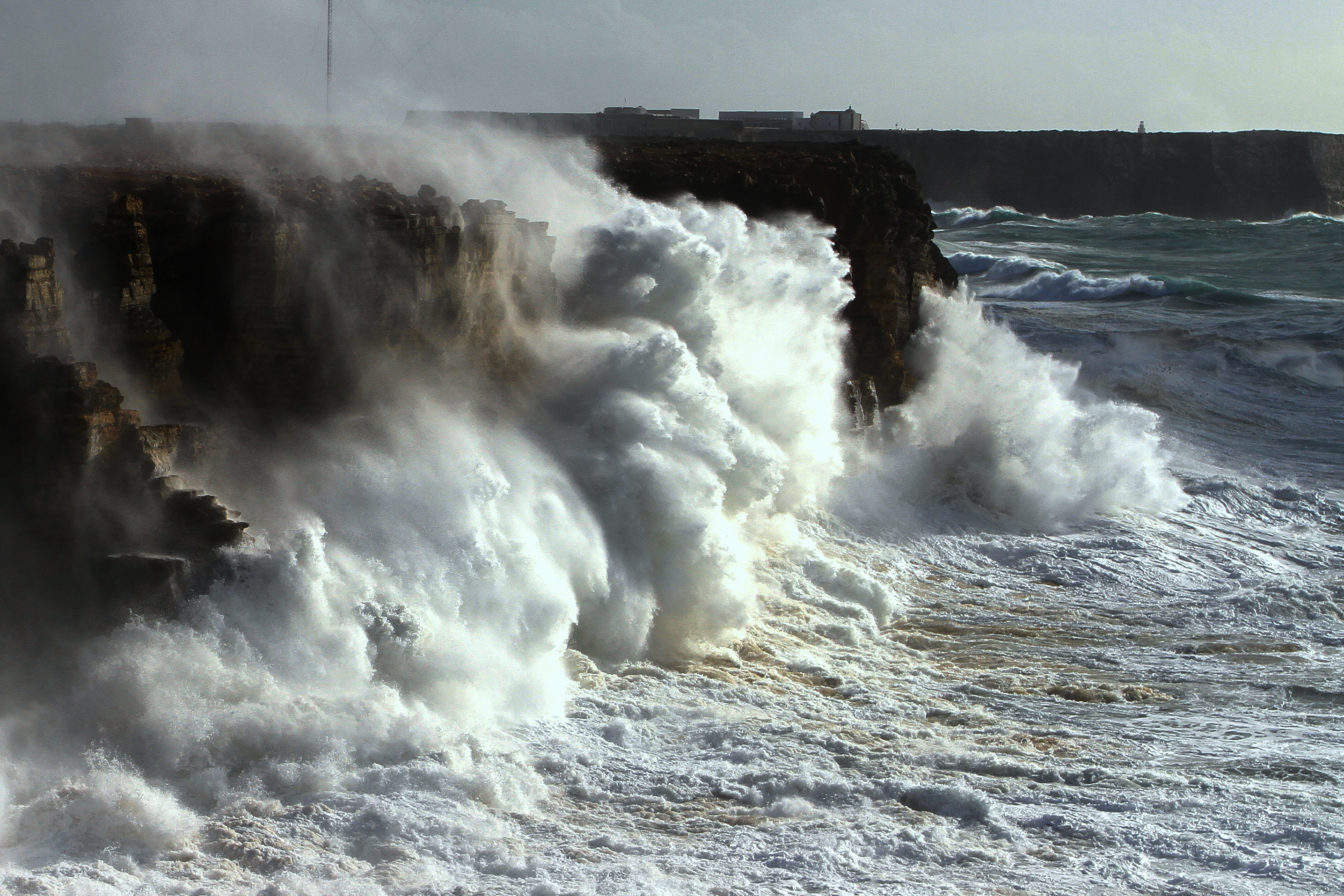 Dia de tormenta maritima no promontório de Sagres. This file was uploaded for Wiki Loves Monuments in Portugal with the unique identifier 70550.